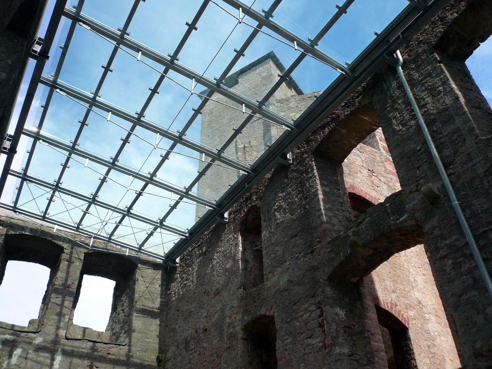 Trimburg, Germany - "Echterbau" direction keep